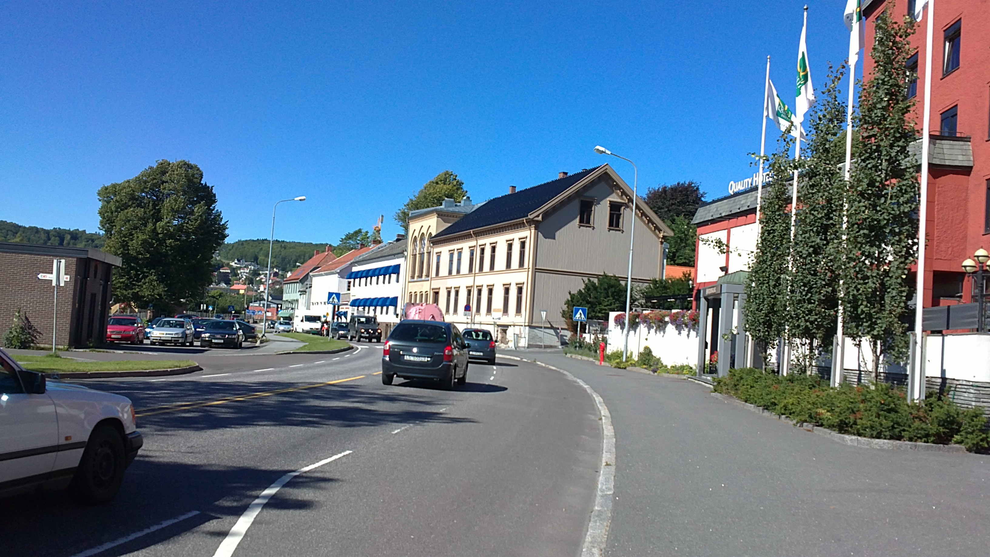 Bilde av Storgata, Larvik